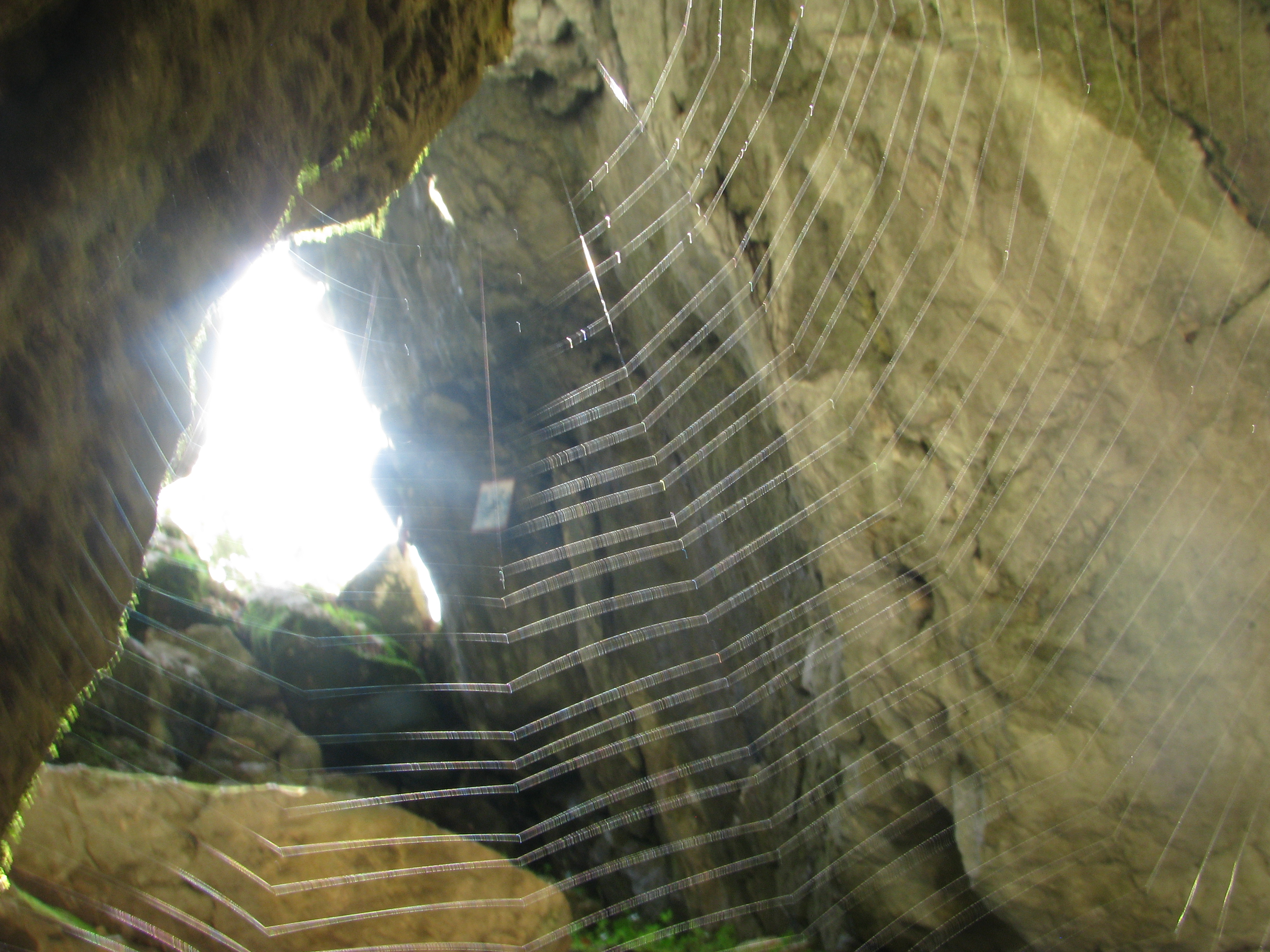 SP008, Spomenik prirode Pavlova Pećina, slika pauka iz unutrašnjosti pećine